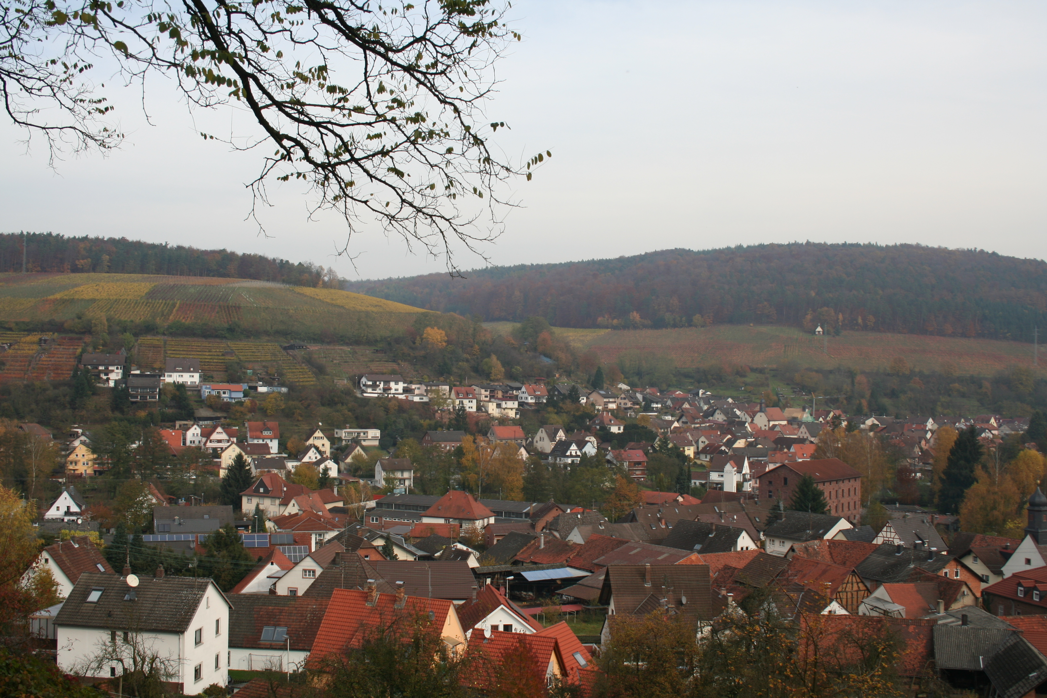 Blick über Elsenfeld, OT Schippach (vorne) und Rück (hinten)